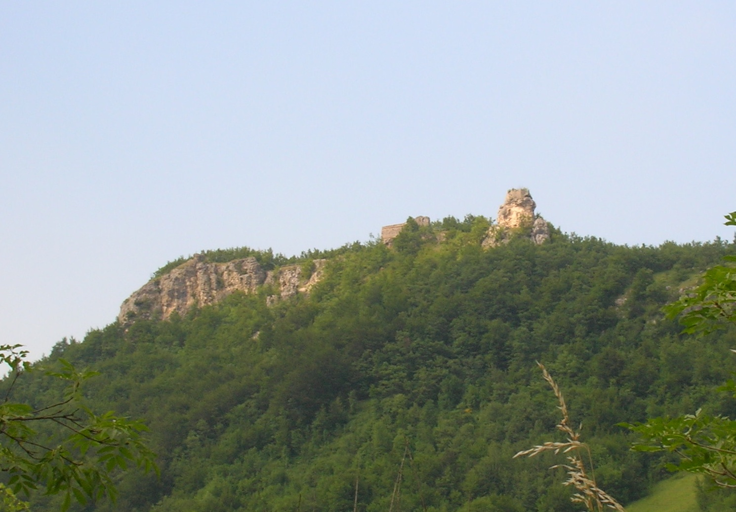 Rovine del Castello dei Conti di Pagliara visto da Pretara (Isola del Gran Sasso d'Italia - TE)